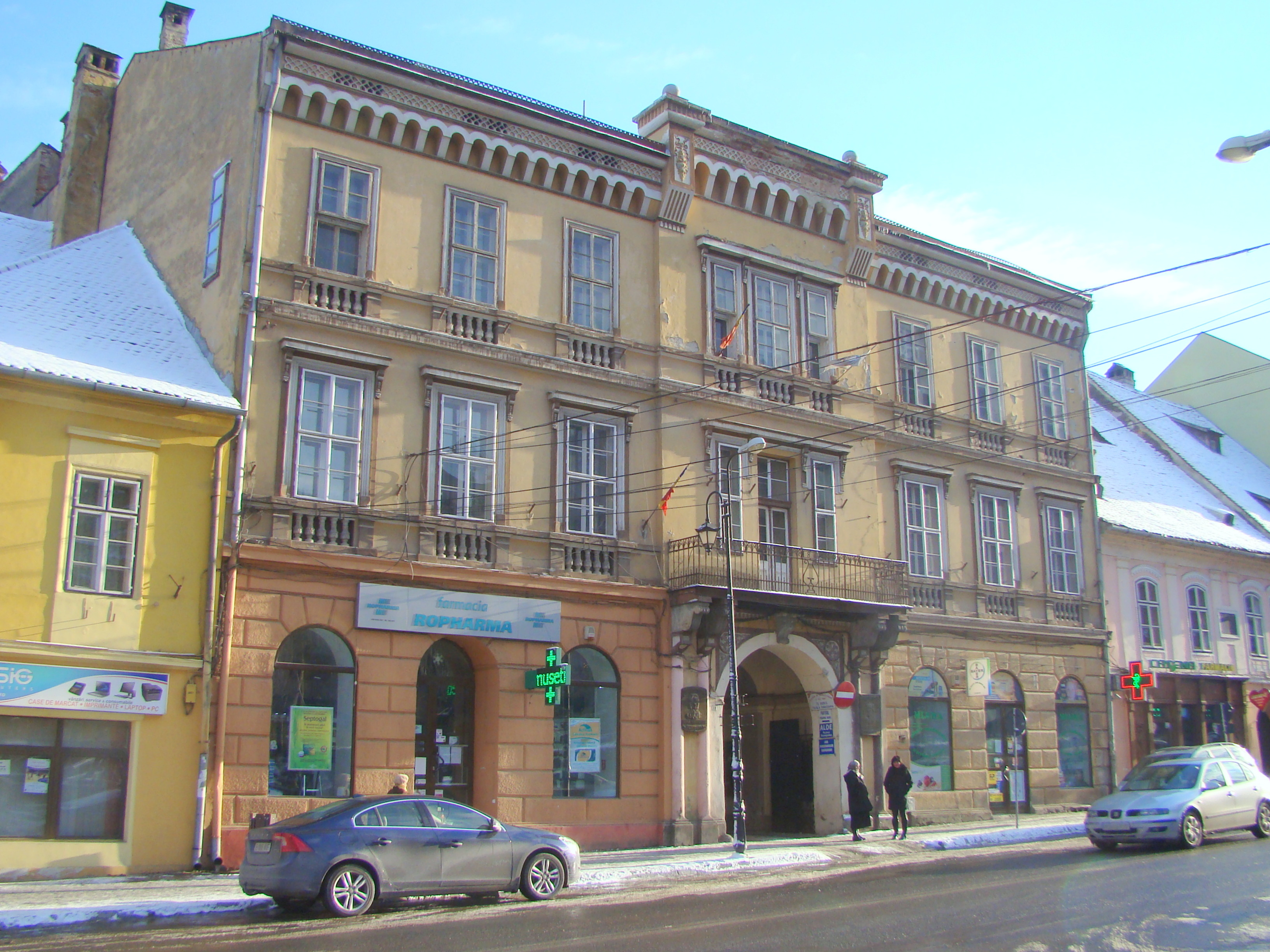 Casa de cultură, municipiul Sighișoara, Piața Oberth Hermann 22 1874 - 1876, 1930 - 1940